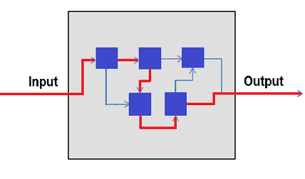 WhiteBoxTesting